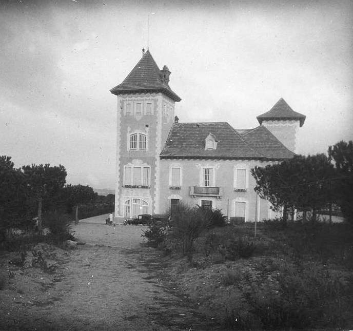 Vista de la Torre Ametller situada al veïnat de Santa Elena d'Agell